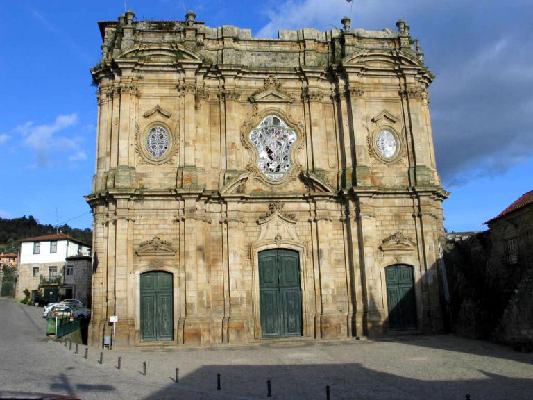 Mosteiro de Santa Maria de Salzedas, Abril 2004